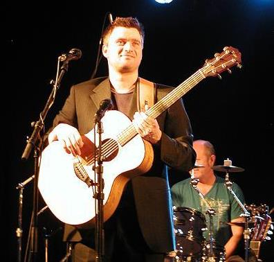 Eskild Dohn, dansk musiker. Billedet er taget til Storyteller med Lars Lilholt i Tinghallen i Viborg.